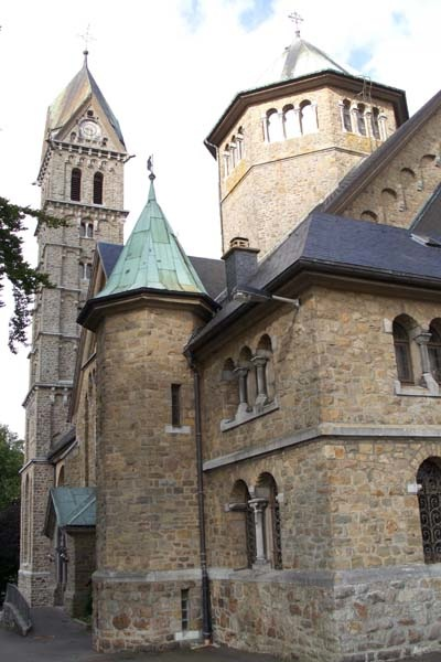 vue de l'église de derrière